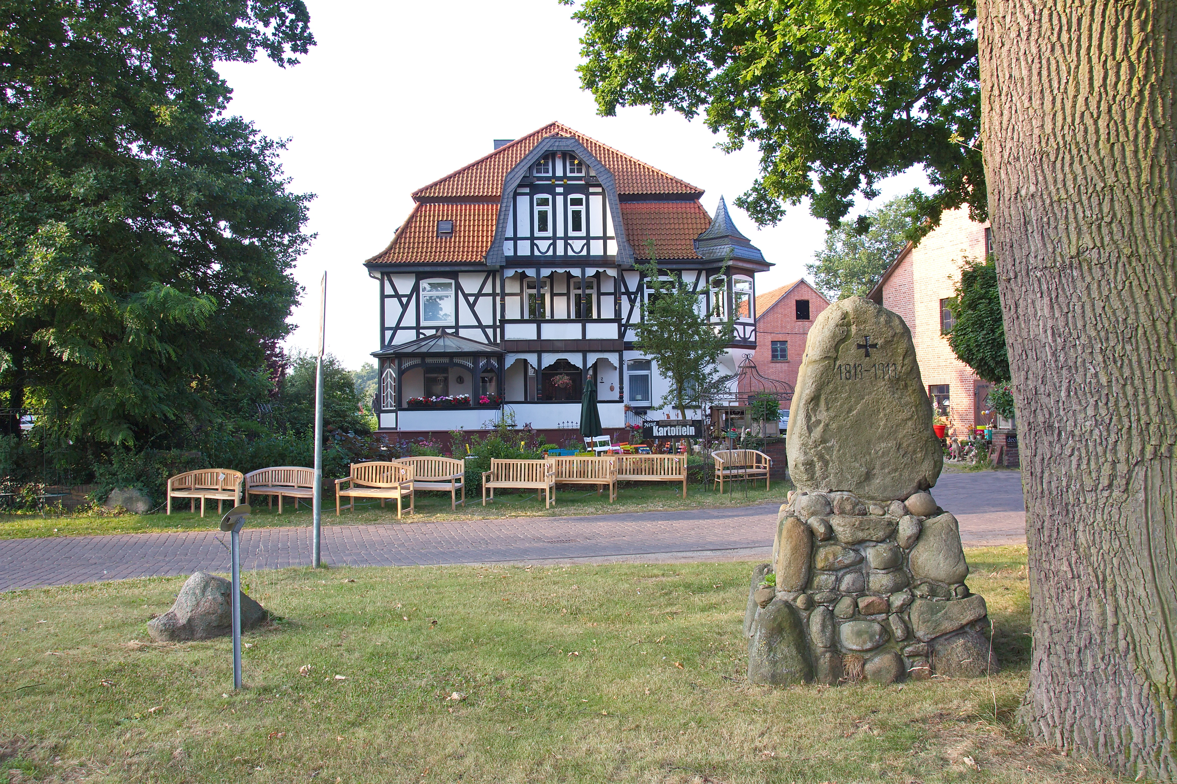 Baudenkmal Im Dorfe 2 in Schillerslage (Burgdorf). Die Villa wurde im Jahre 1912 im Landhausstil erbaut und steht südlich des Kriegerdenkmales, das am durch die Straßen "Im Dorfe" und "Sprengelstraße" gebildeten Dreieck liegt.